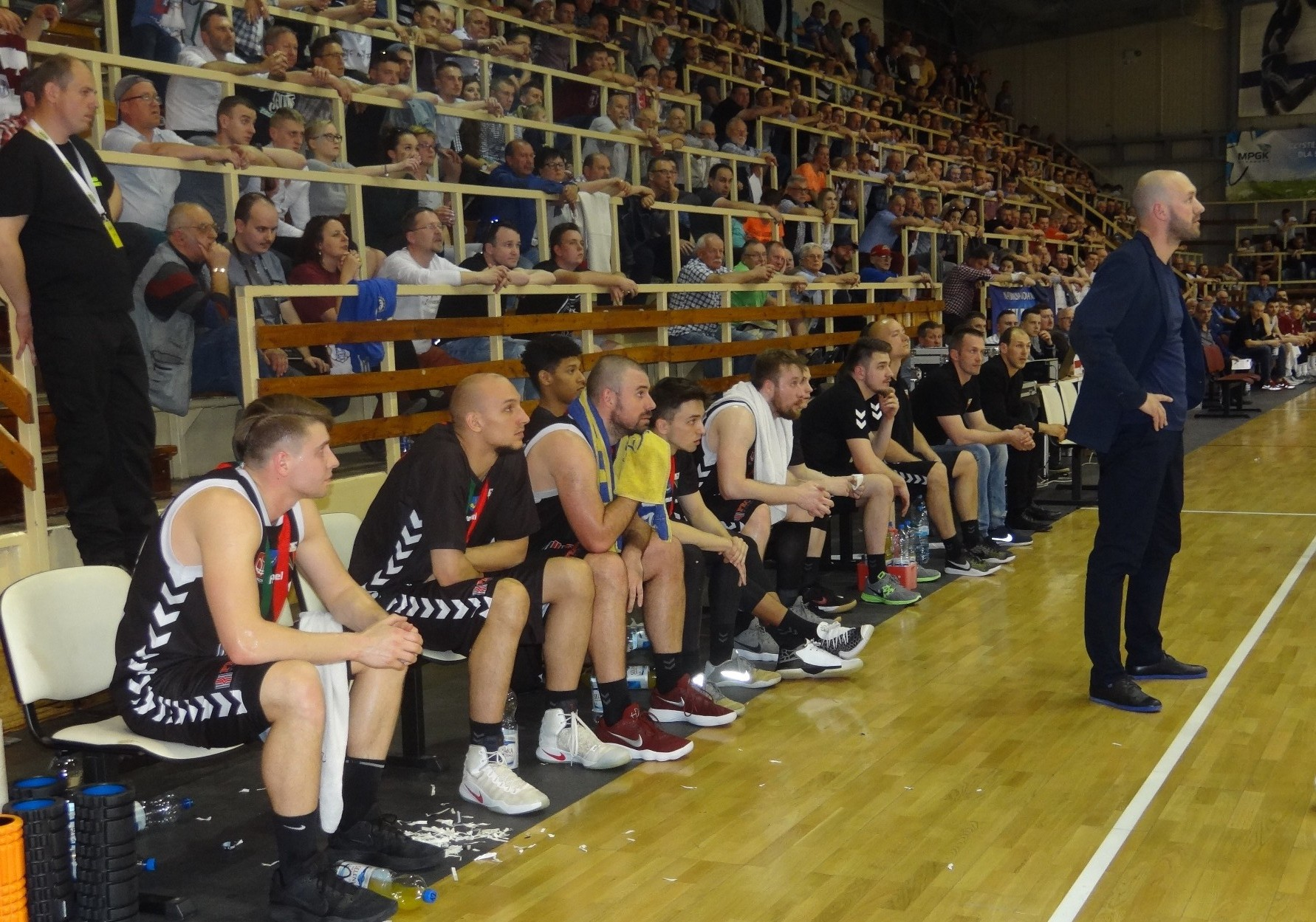 GKS Tychy w meczu ze Spójnią Stargard (28.04.2018)